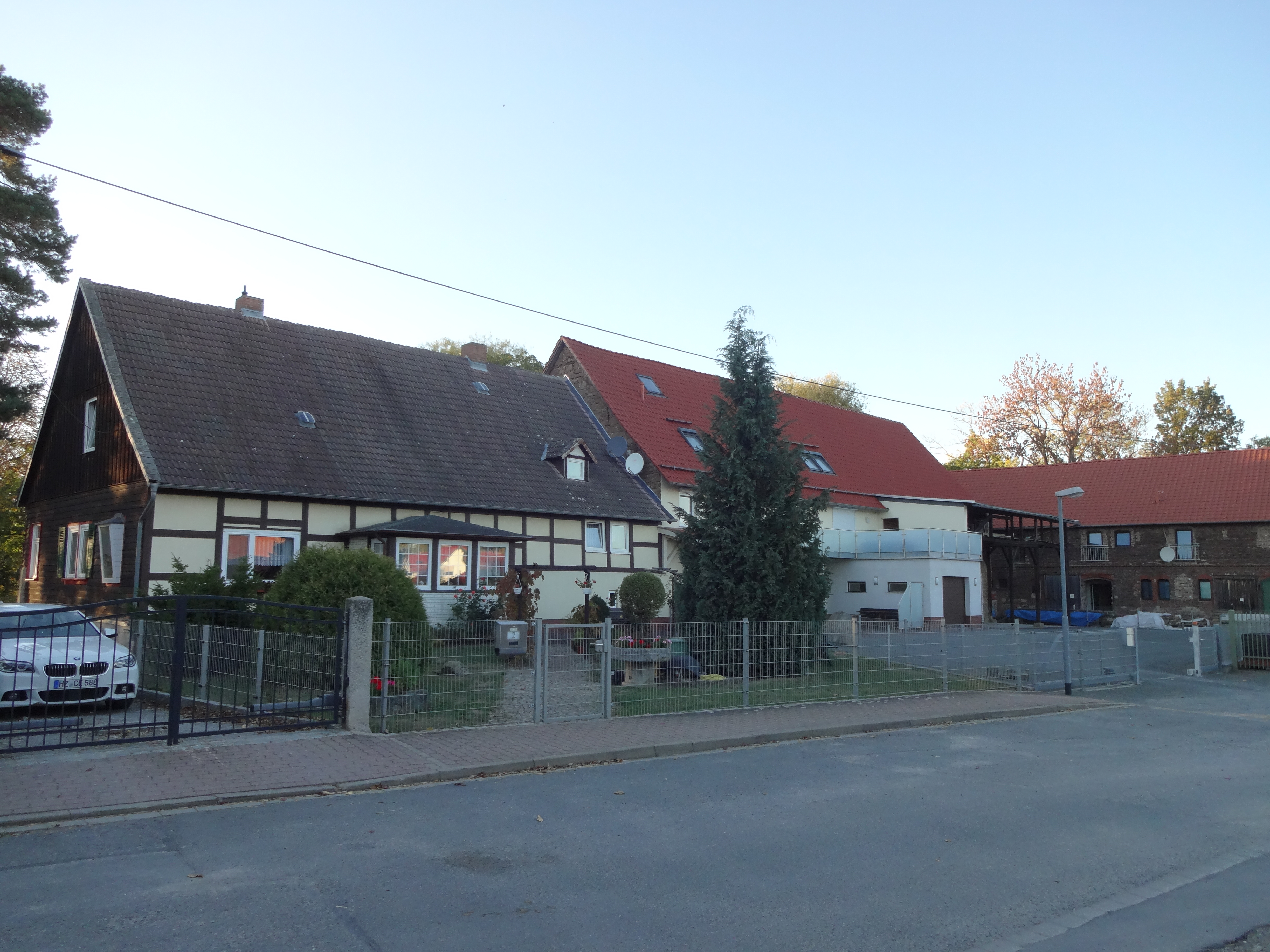 Teil der denkmalgeschützten gräflichen Domäne Am Park 1, 2, 3 in Darlingerode